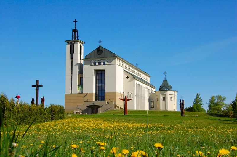 Lietuvos kankinių bažnyčia Domeikavoje